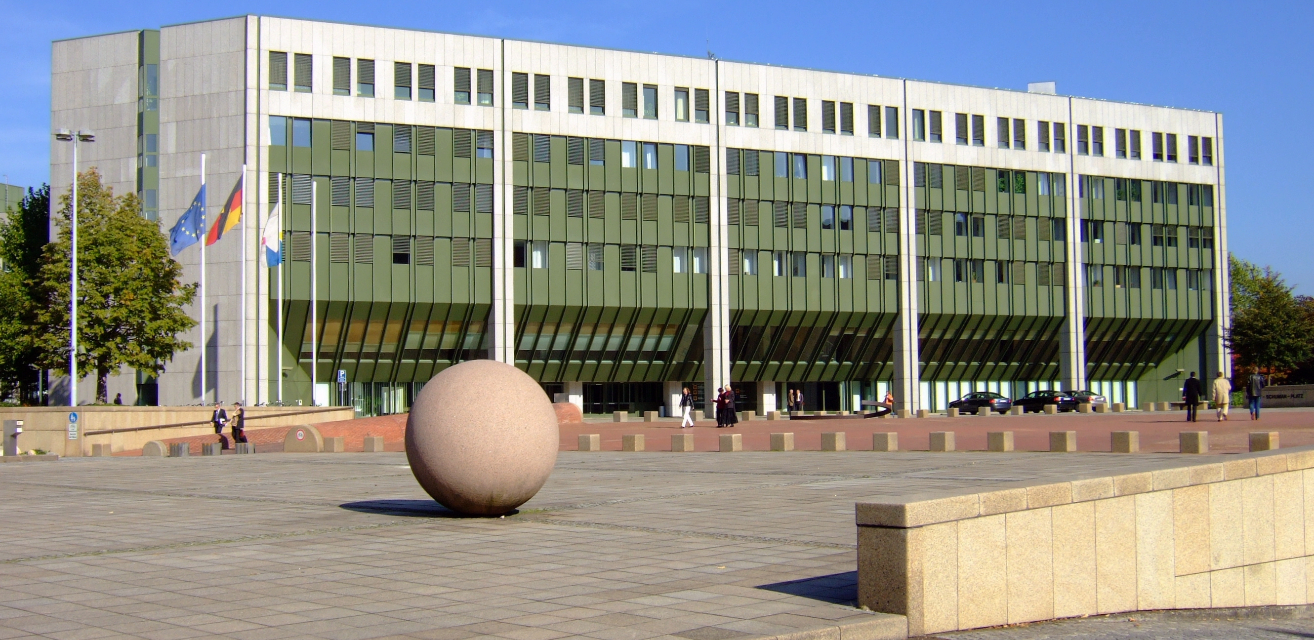 Leo Kornbrust: o.T. (1987/Bonn), im Hintergrund das Bundesministerium für Umwelt, Naturschutz, Bau und Reaktorsicherheit (zum Zeitpunkt der Aufnahme: Bundesministerium für Umwelt, Naturschutz und Reaktorsicherheit)